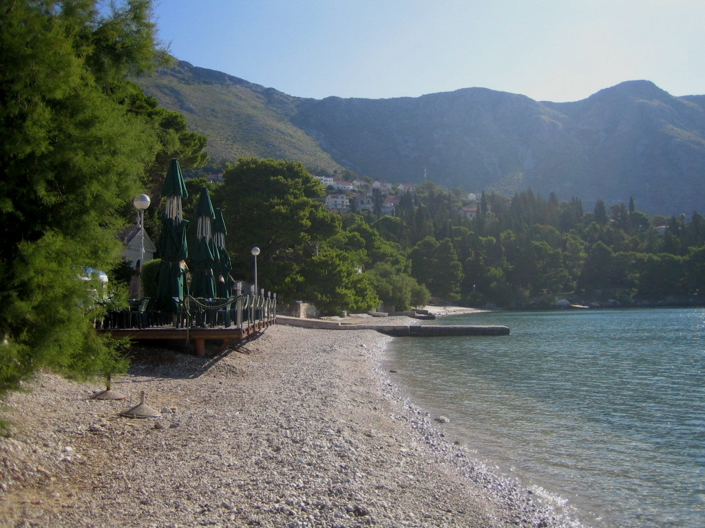 Playa croata en las inmediaciones de Dubrovnik